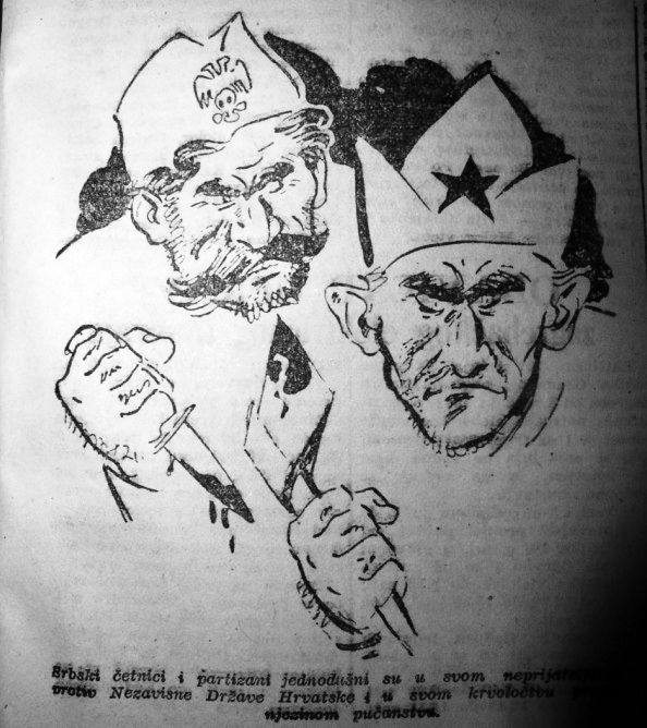 Promidzbena karikatura iz NDH koja predstavlja partizane i četnike kao zločince